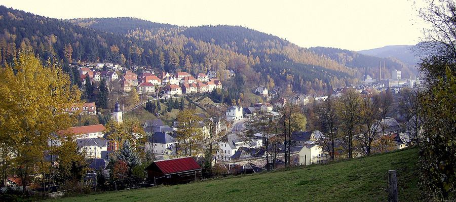 Blick auf Schmiedeberg, Blick nach Süd-Ost